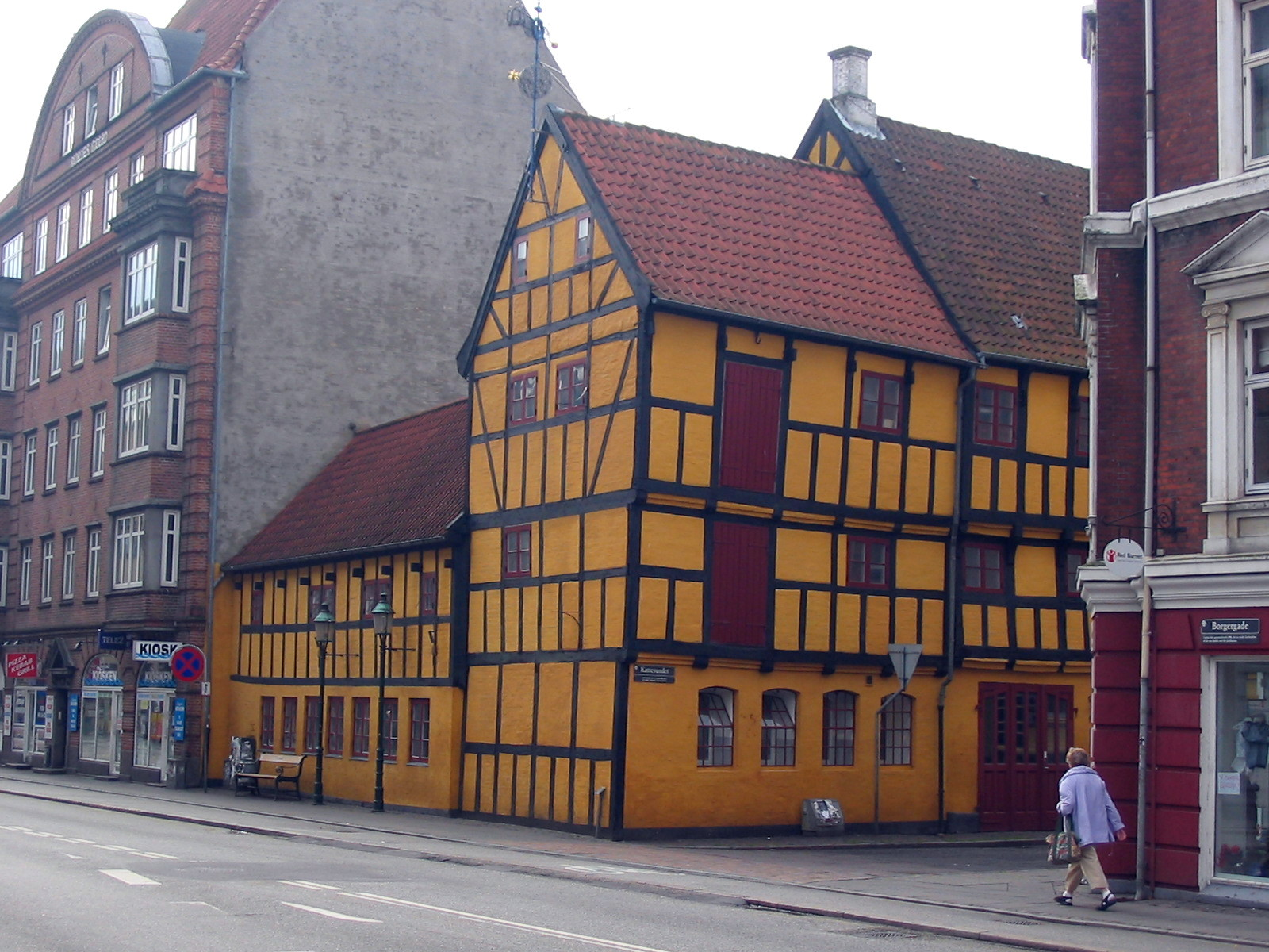 Gammelt bindingsværkhus i Aalborg by